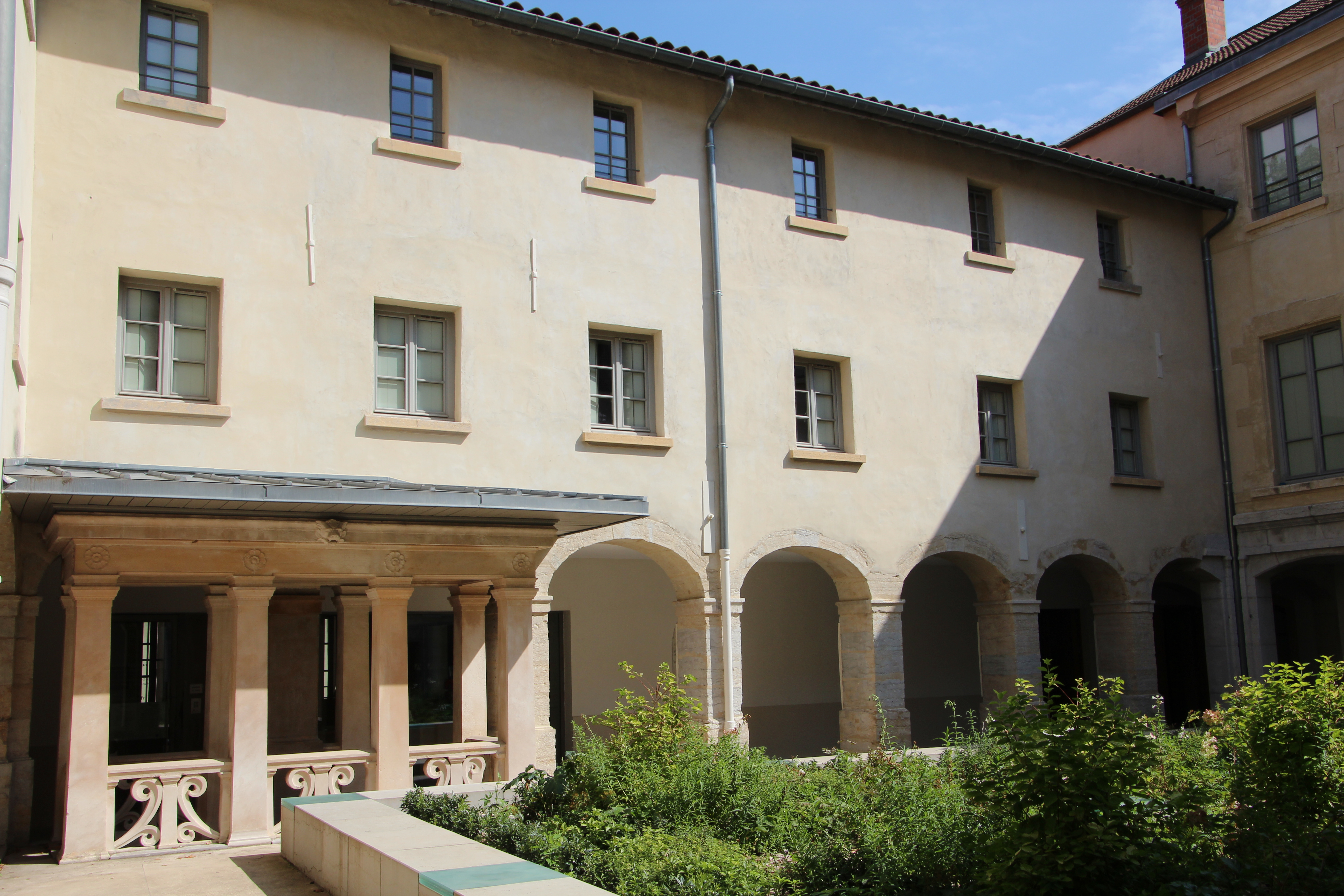 Entrée de l'Espace Culturel du Christianisme à Lyon